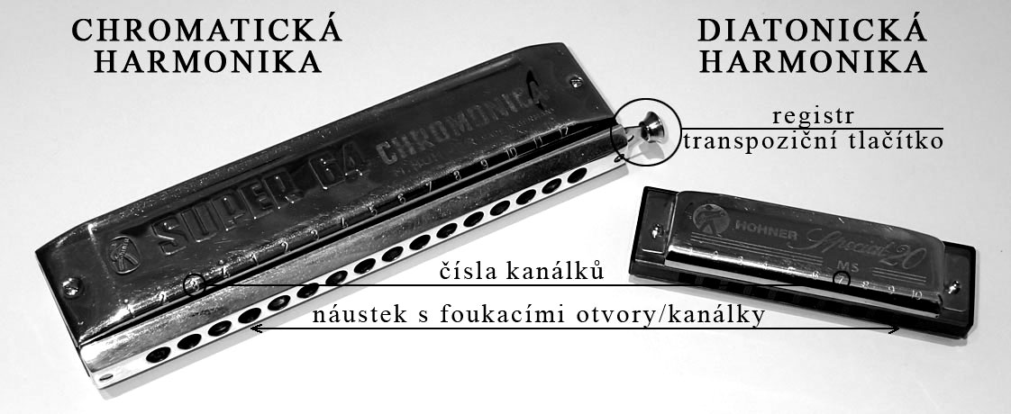 Chromatická harmonika je větší a na pravé straně má registr. Obě harmoniky mají očíslované kanálky.